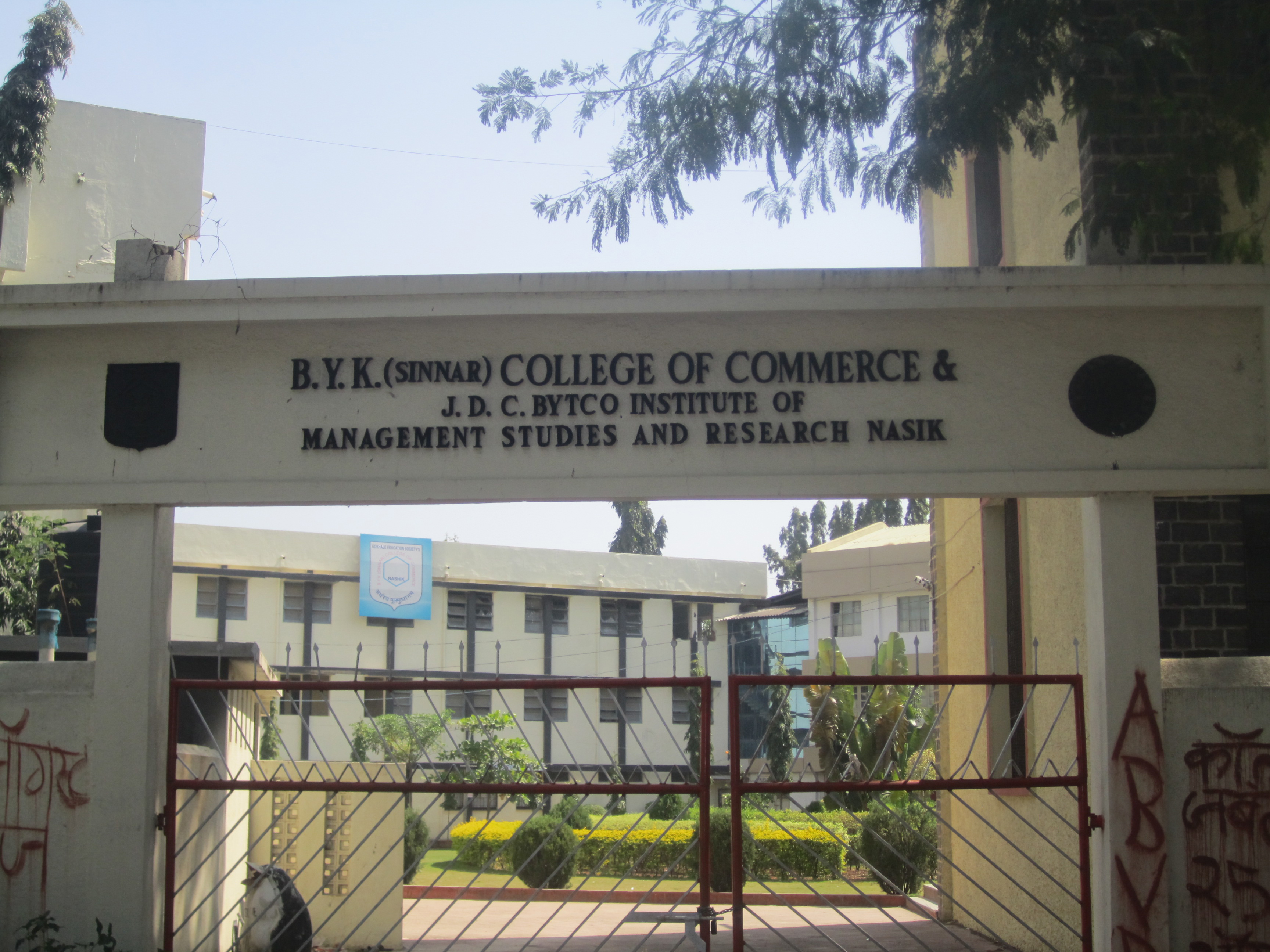 BYK College Nashik